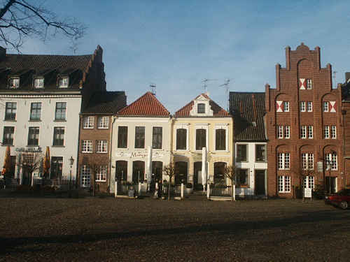 Stadtkern von Kalkar, denkmalgeschützte Häuser Markt 11 bis Markt 16 (v.l.n.r.)